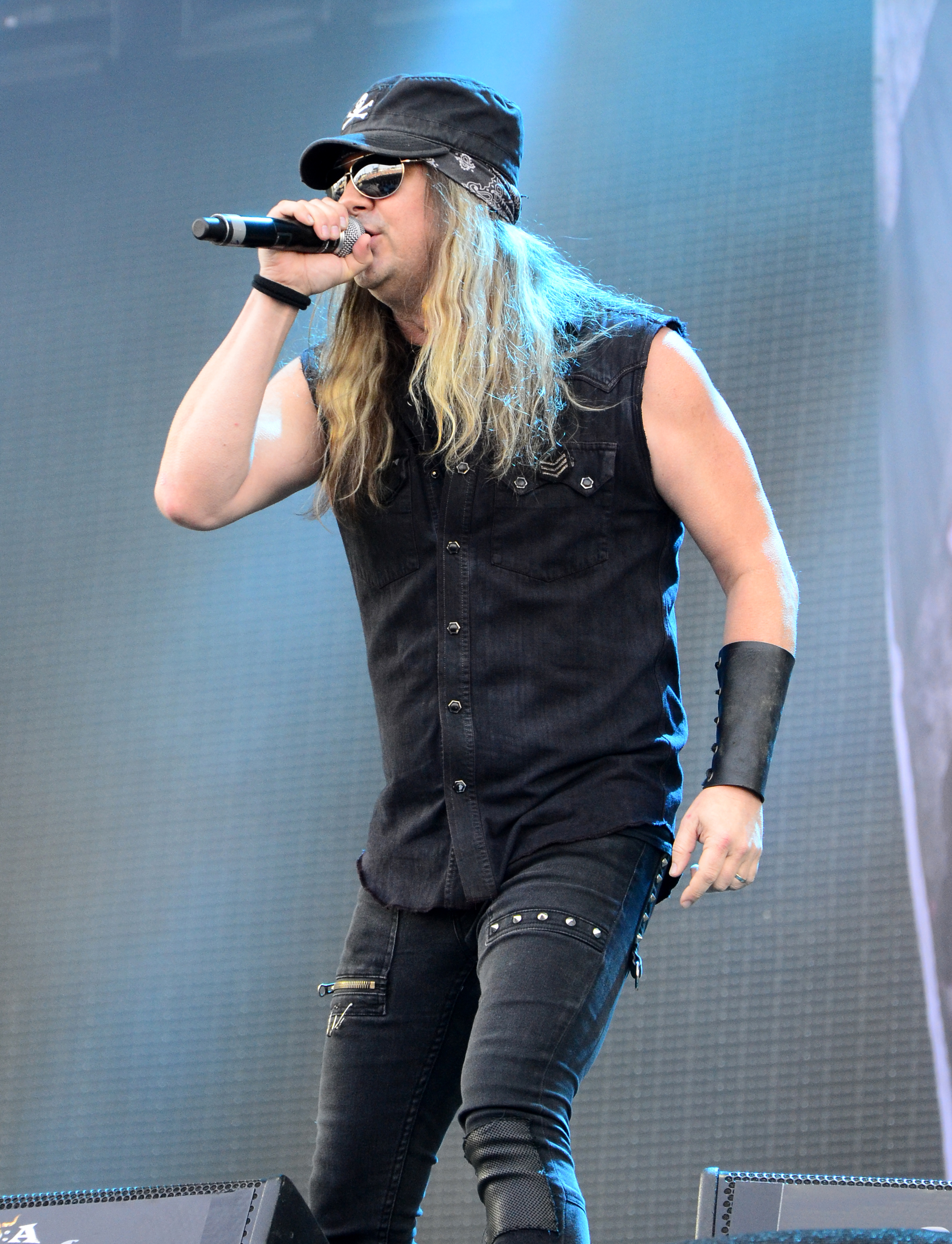 Johnny Solinger von Skid Row beim Wacken Open Air 2014